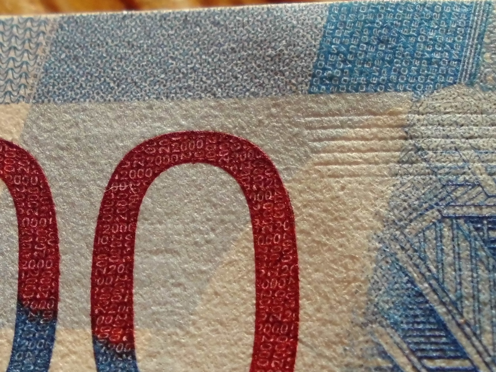 2000 российских рублей образца 2017 года. Реверс, слева сверху. Микротекст (БАНКРОССИИ, 2000РУБЛЕЙ, 2000)